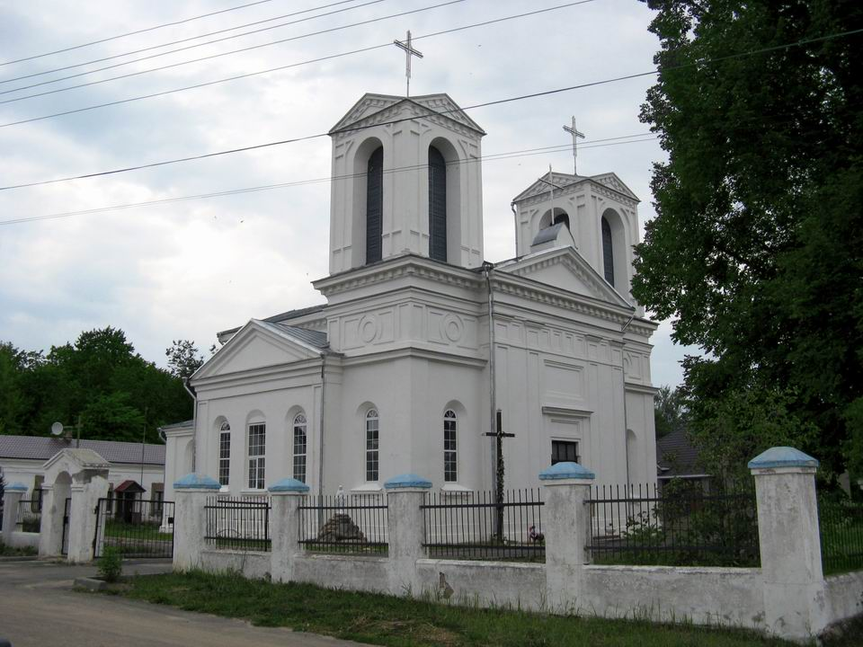 Беларуская (тарашкевіца): Лепель